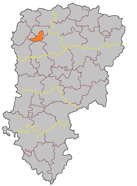 Кантон Сен-Кантен-Юг на карте департамента Эна